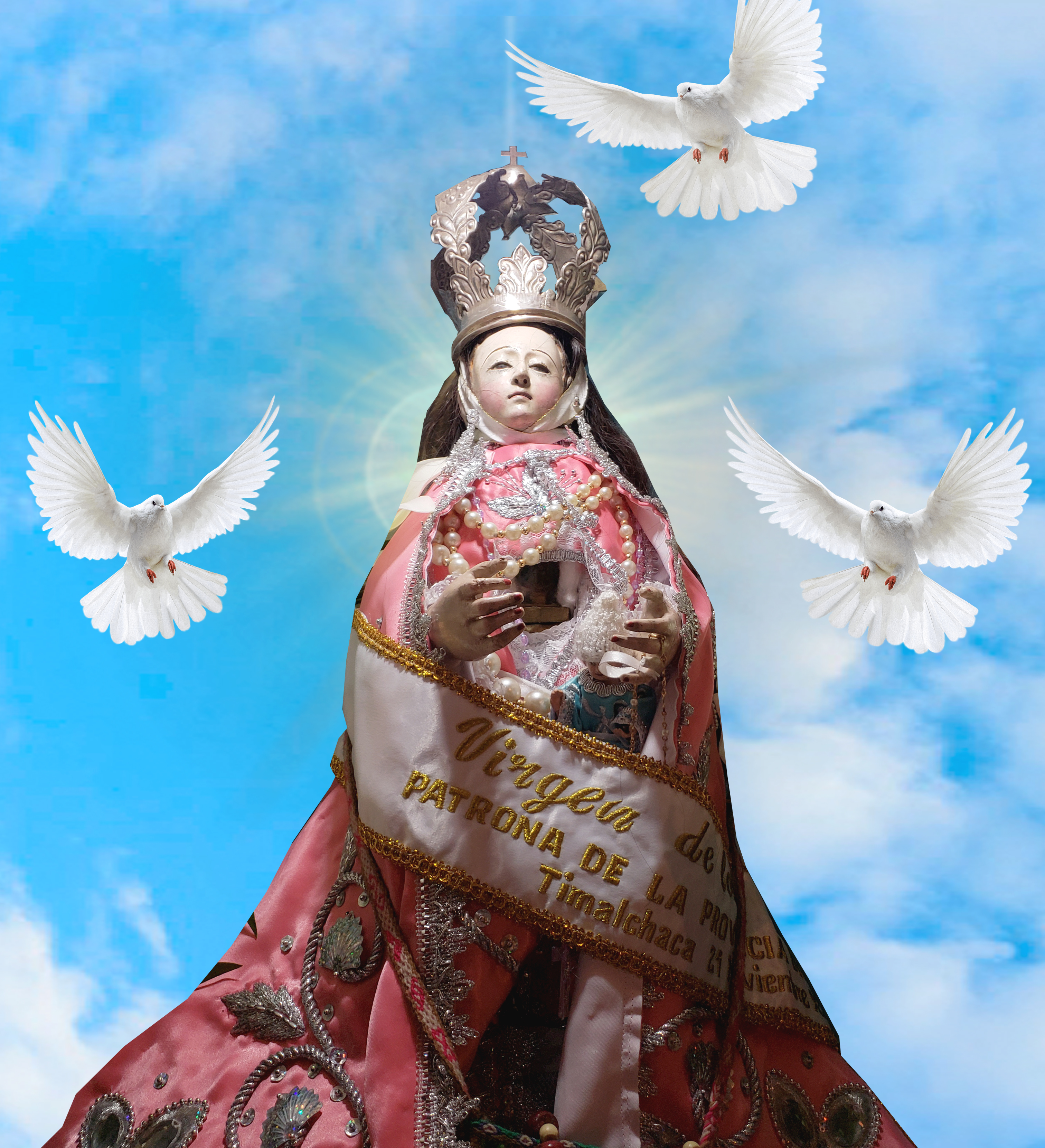 Retrato de la Virgen de Timalchaca, fotografiada en el año 2018